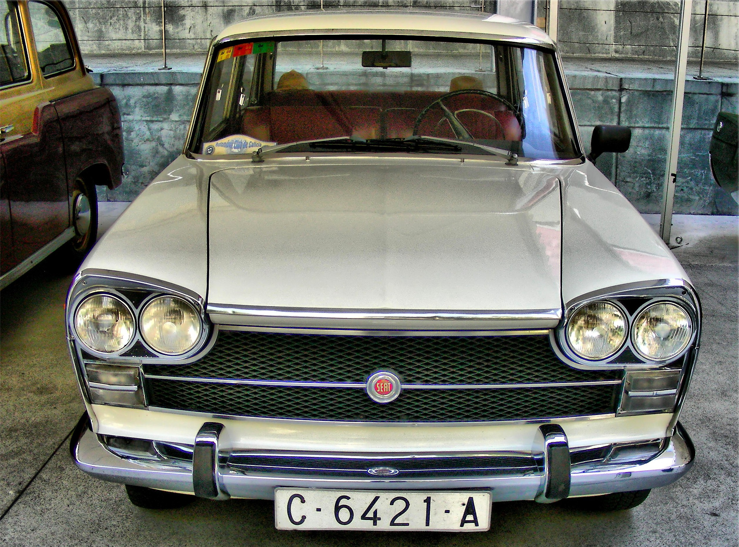 1839-Seat 1500 en Coruña